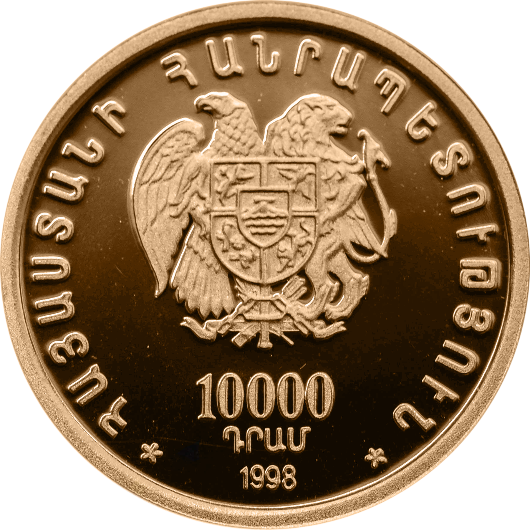 Аверс памятных монет Армении 1998 года "Ани" и "Эчмиадзин" - 10000 драм - золото 900